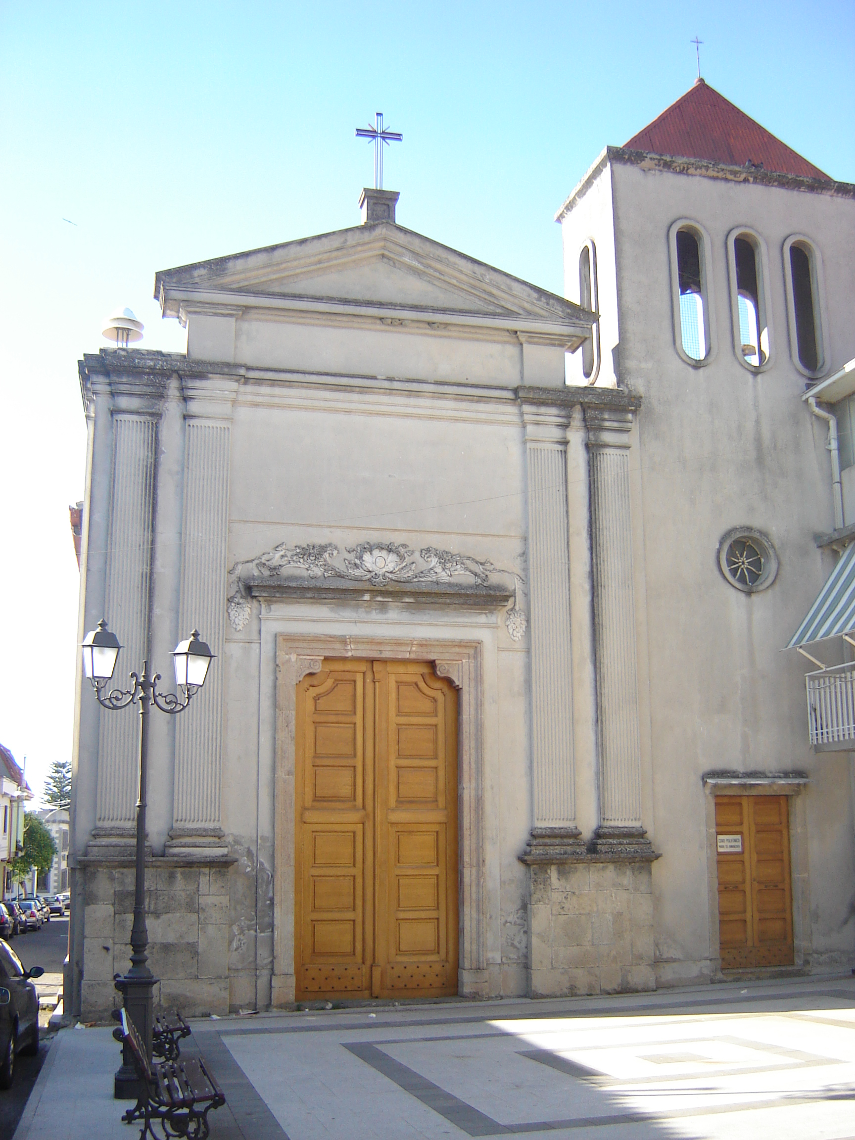 Chiesa di San Giuseppe. Cupi e suggestivi i sotterranei con le cripte utilizzate per l'essiccazione dei cadaveri seduti.